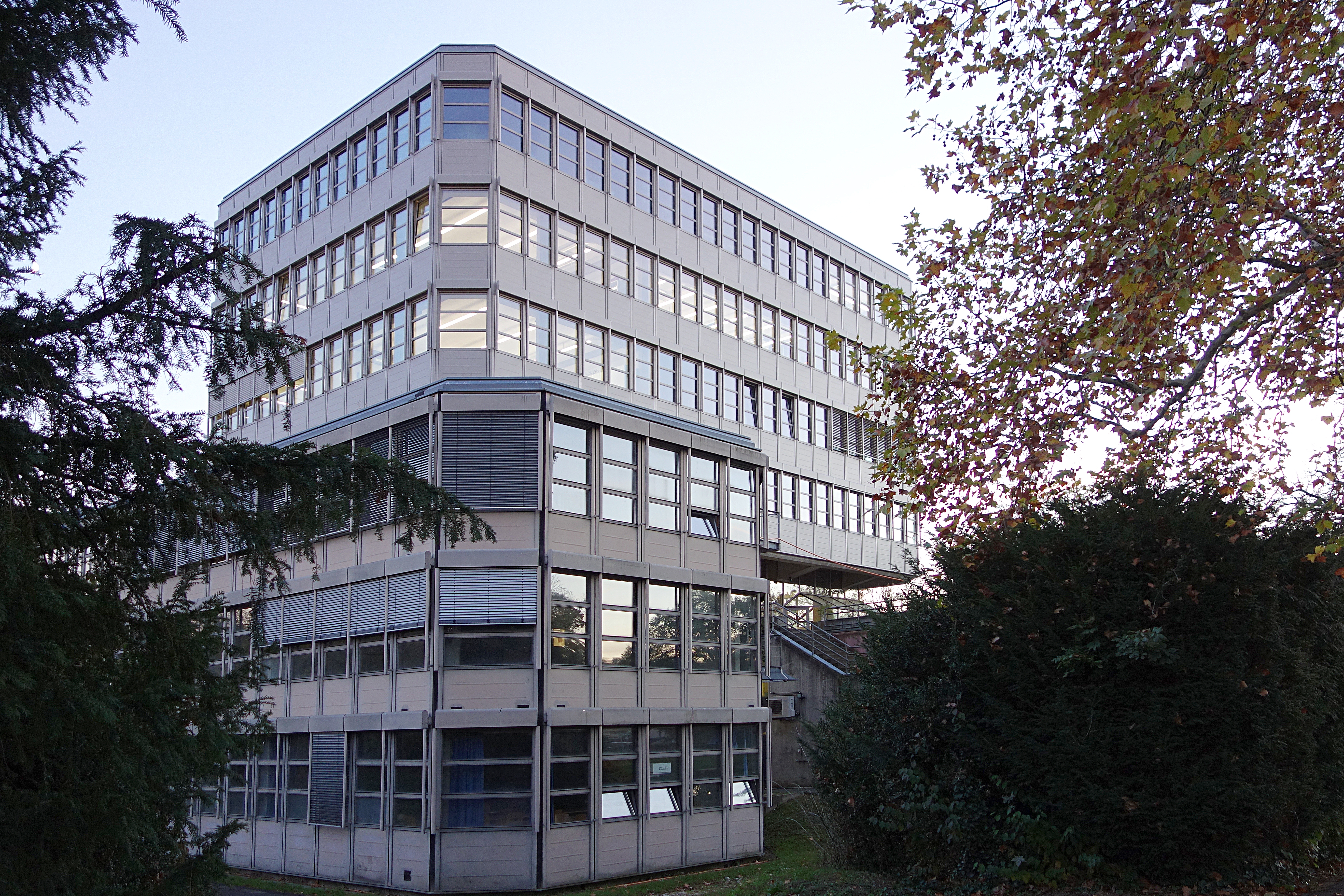 Gymnasium Münchenstein, Mittelschule im Kanton Baselland